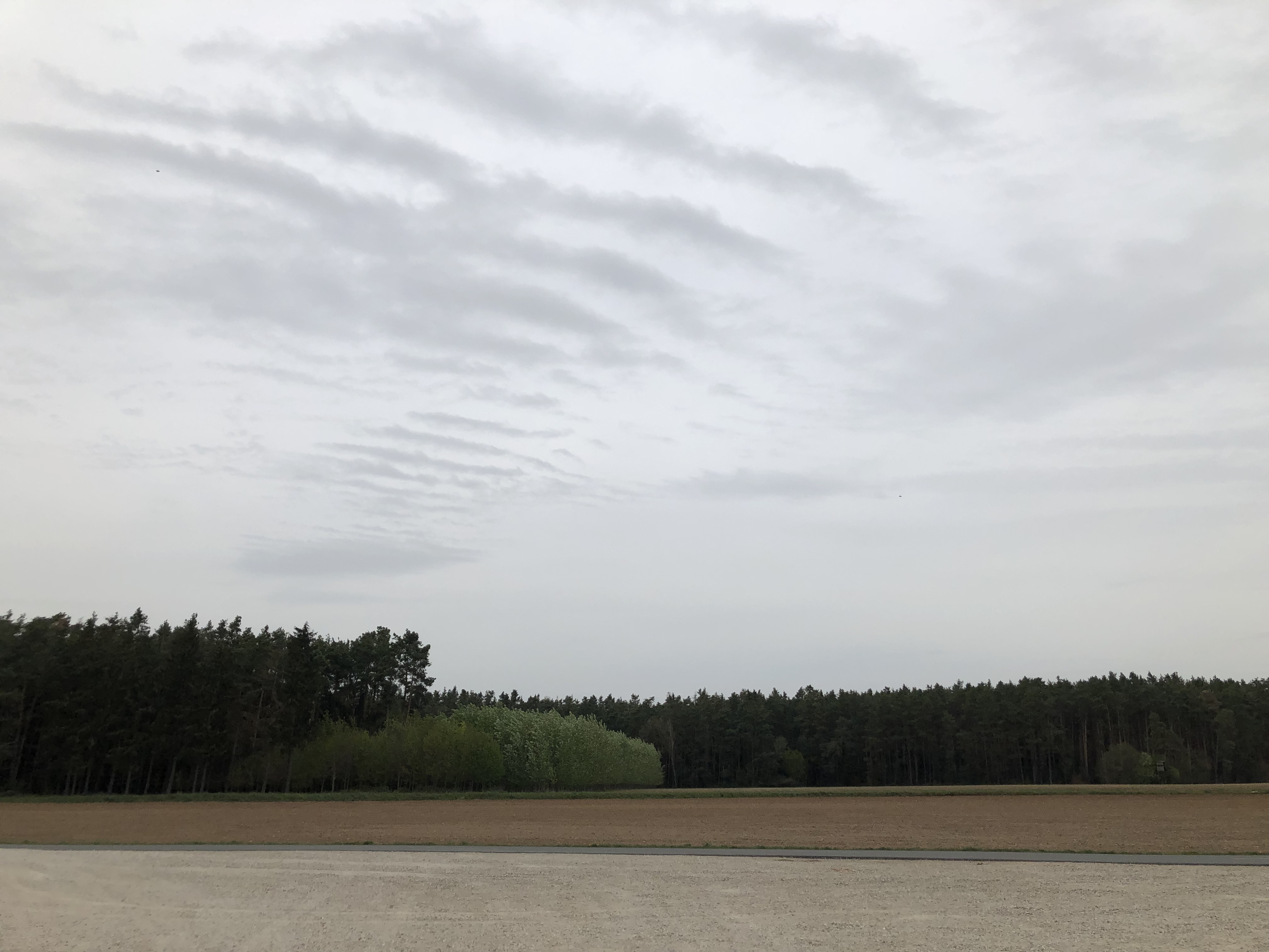 Landschaft Bayern Raitersaich